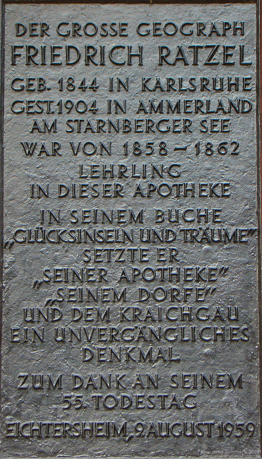 Gedenktafel an der Alten Apotheke in Angelbachtal-Eichtersheim